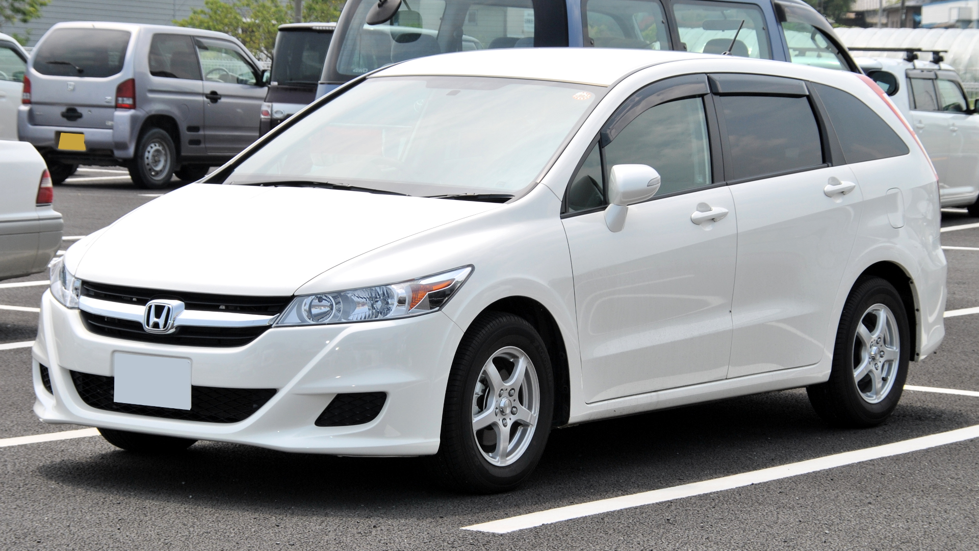 ホンダ・ストリーム（2代目 後期型）